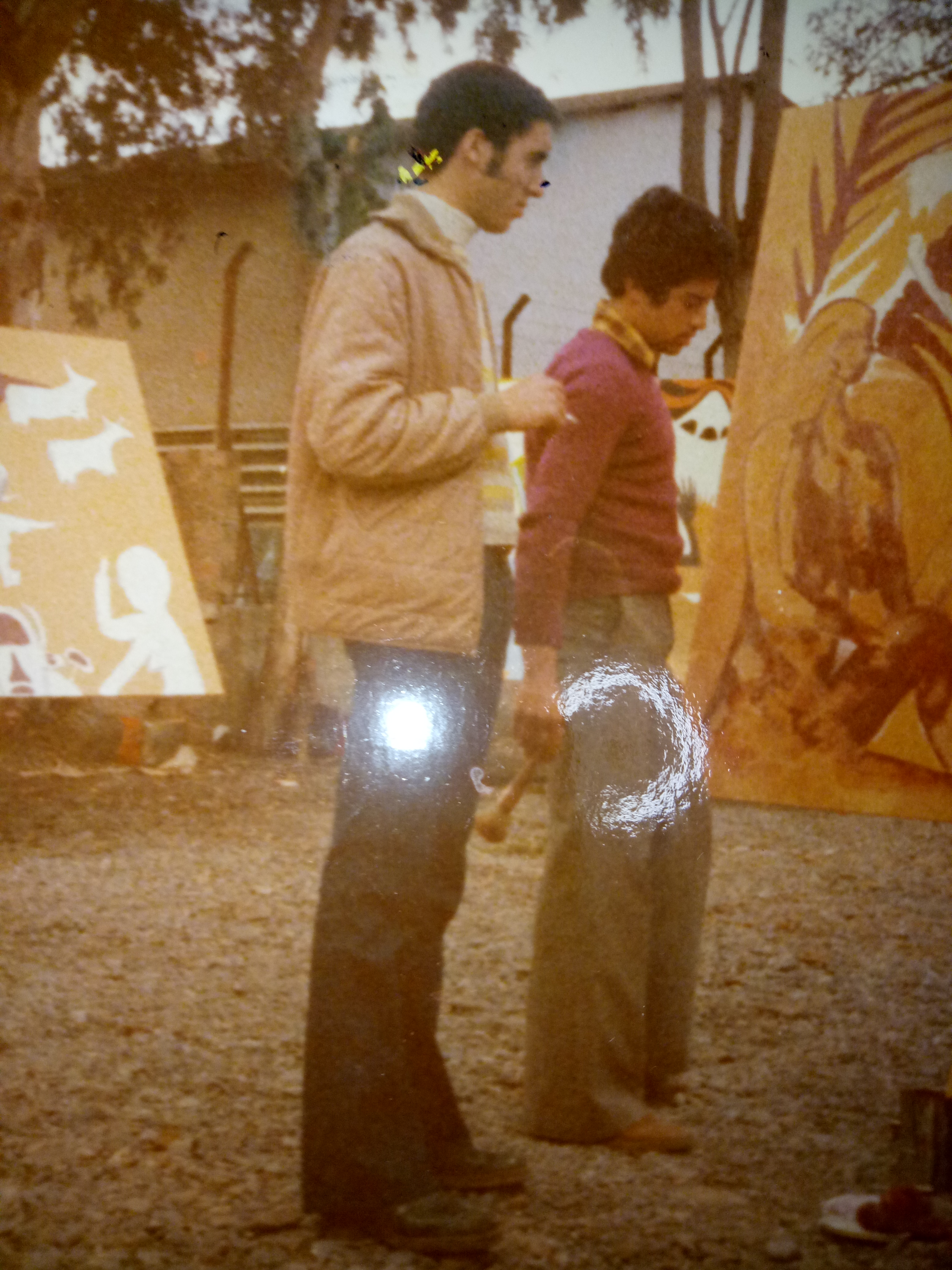 Bâaziz hammache durant les jeux africaine de 1978